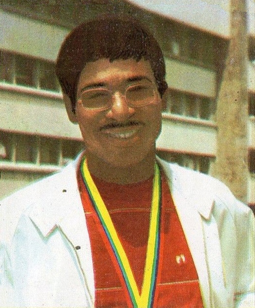 MUNCHEN/MONACO '72-PANINI-Figurina n.25- RUSSELL - USA - PUGILATO -Rec